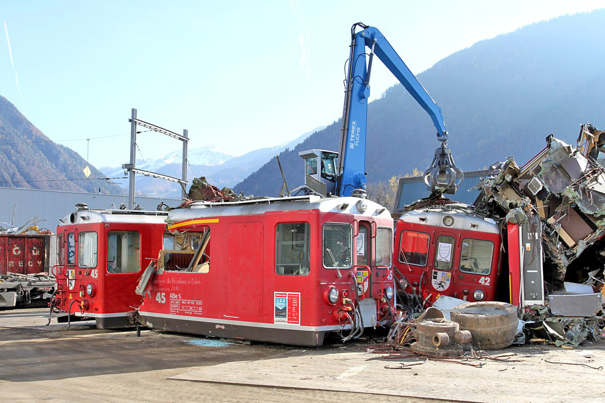 Photo: Christof BENZ le 09-11-2010 Le 4 novembre 2010 les motrices 41-42 et 45 de la ligne de la Bernina sont parties à la casse après 46 ans de bons et loyaux services.